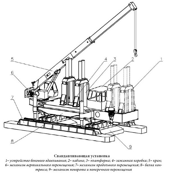 Устройство сваевдавливающей установки